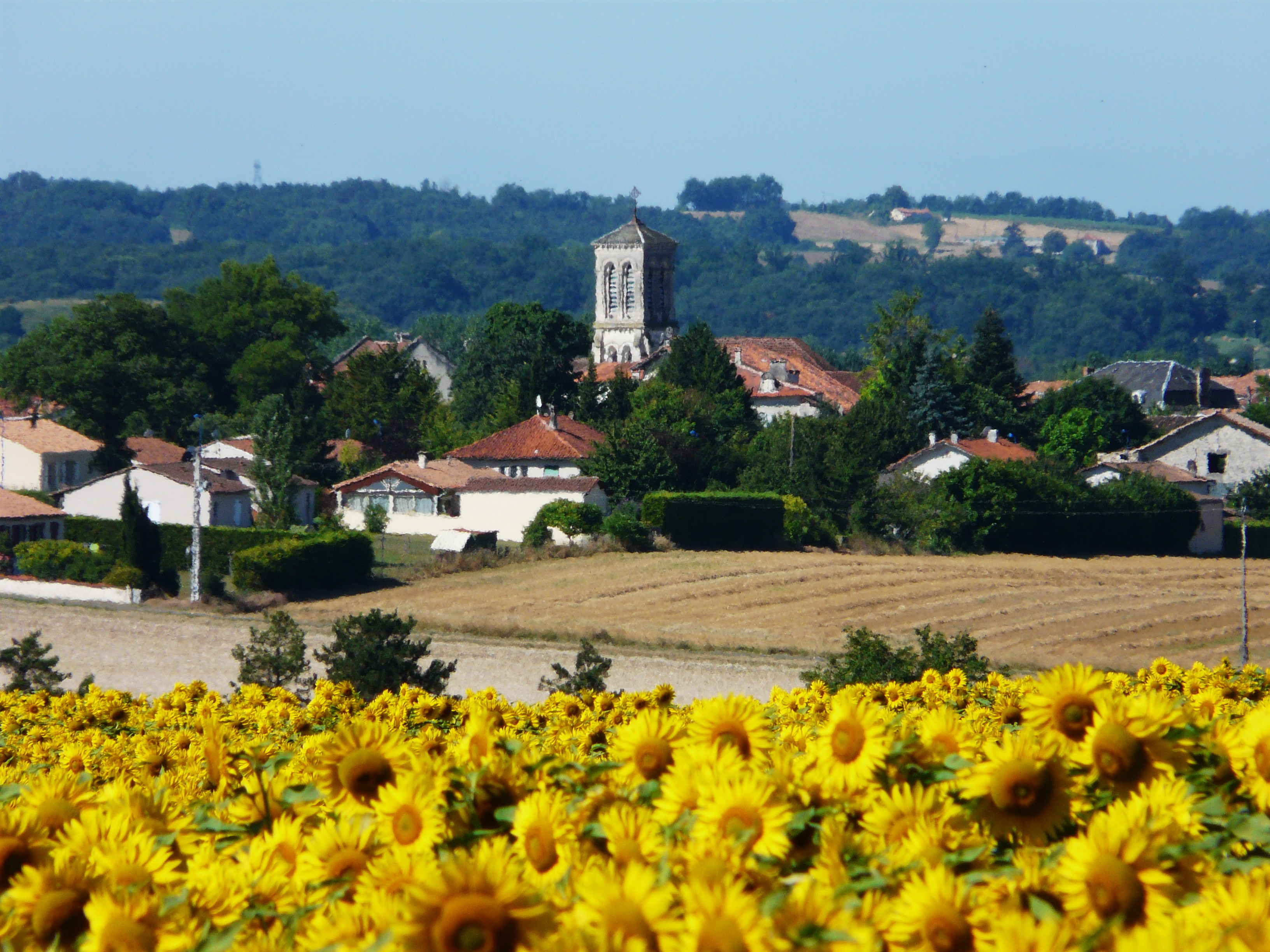 Le bourg de Gout-Rossignol, ondulant à travers l'atmosphère estivale surchauffée